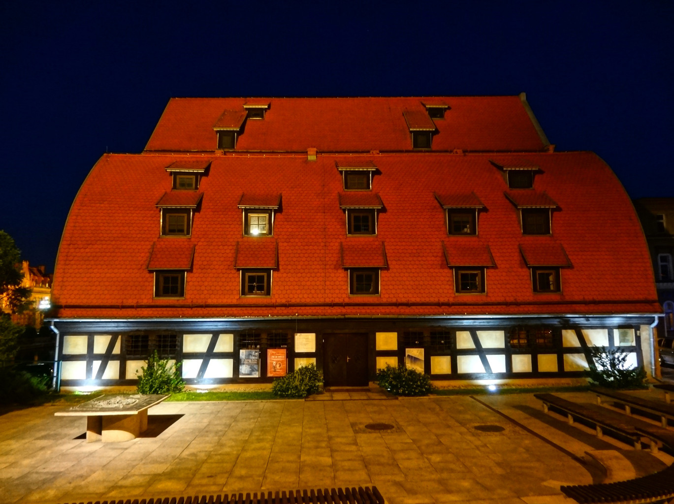 Spichrze nad Brdą w Bydgoszczy, zbud. w latach 1793-1800, od 1964 r. w gestii Muzeum Okręgowego